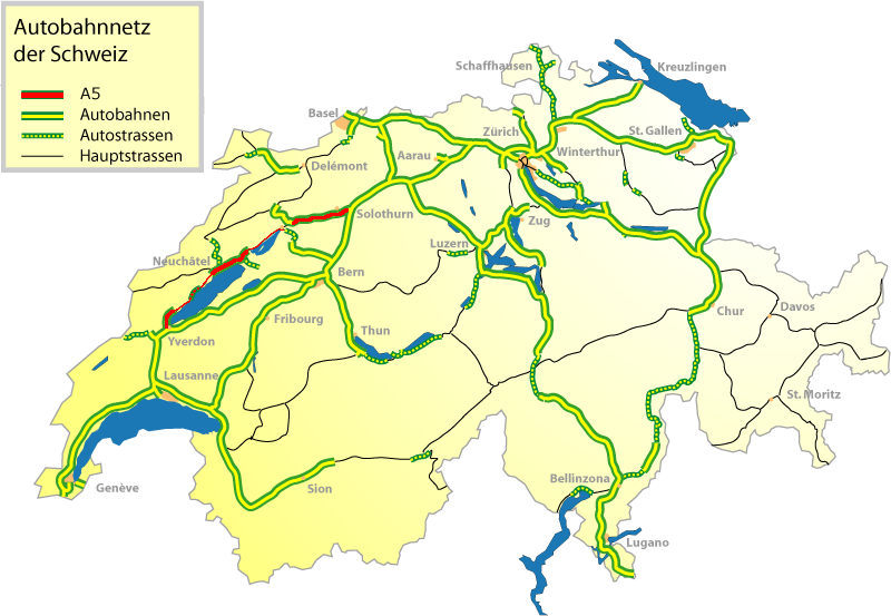 Verlauf der Autobahn A5 in der Schweiz